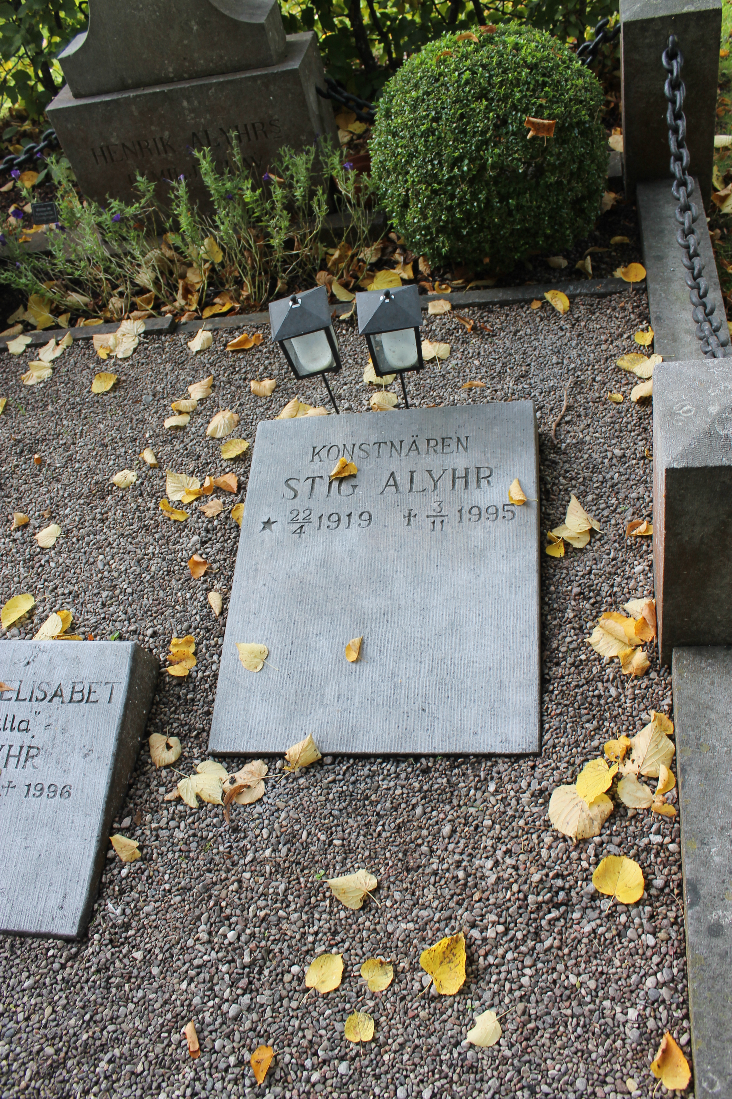 Stig Alyhrs gravsten på Södra kyrkogården i Visby